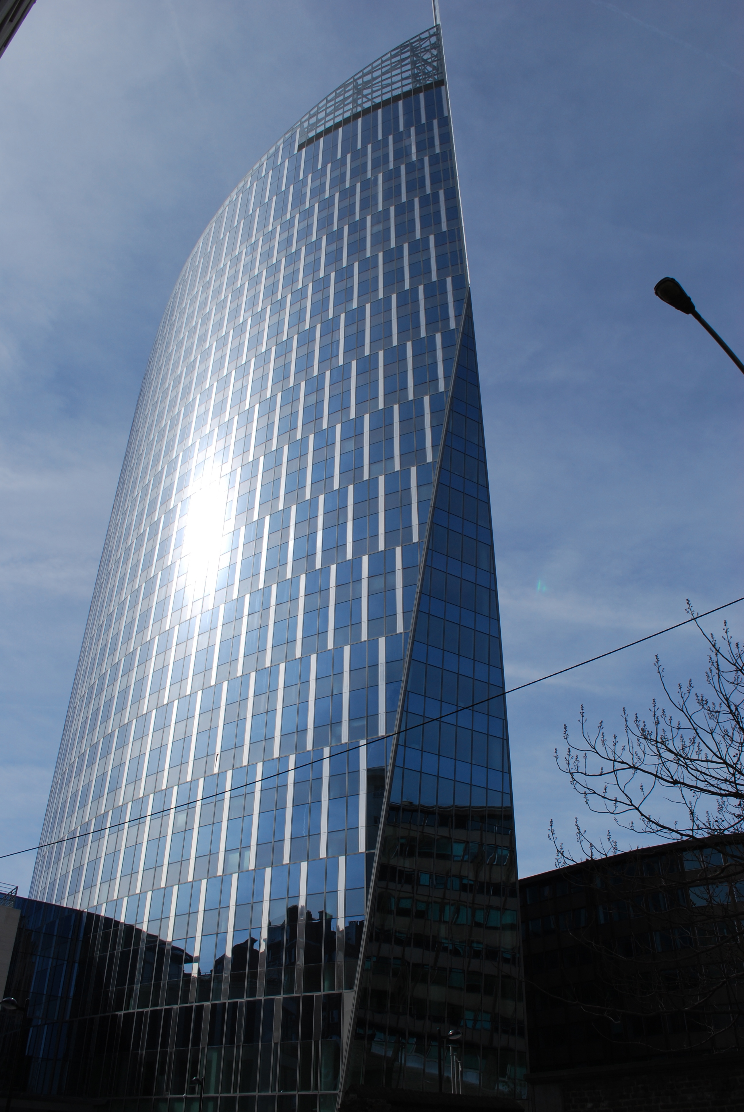 Vue de la tour du Ministère des Finances, rue de Fragnée à Liège.